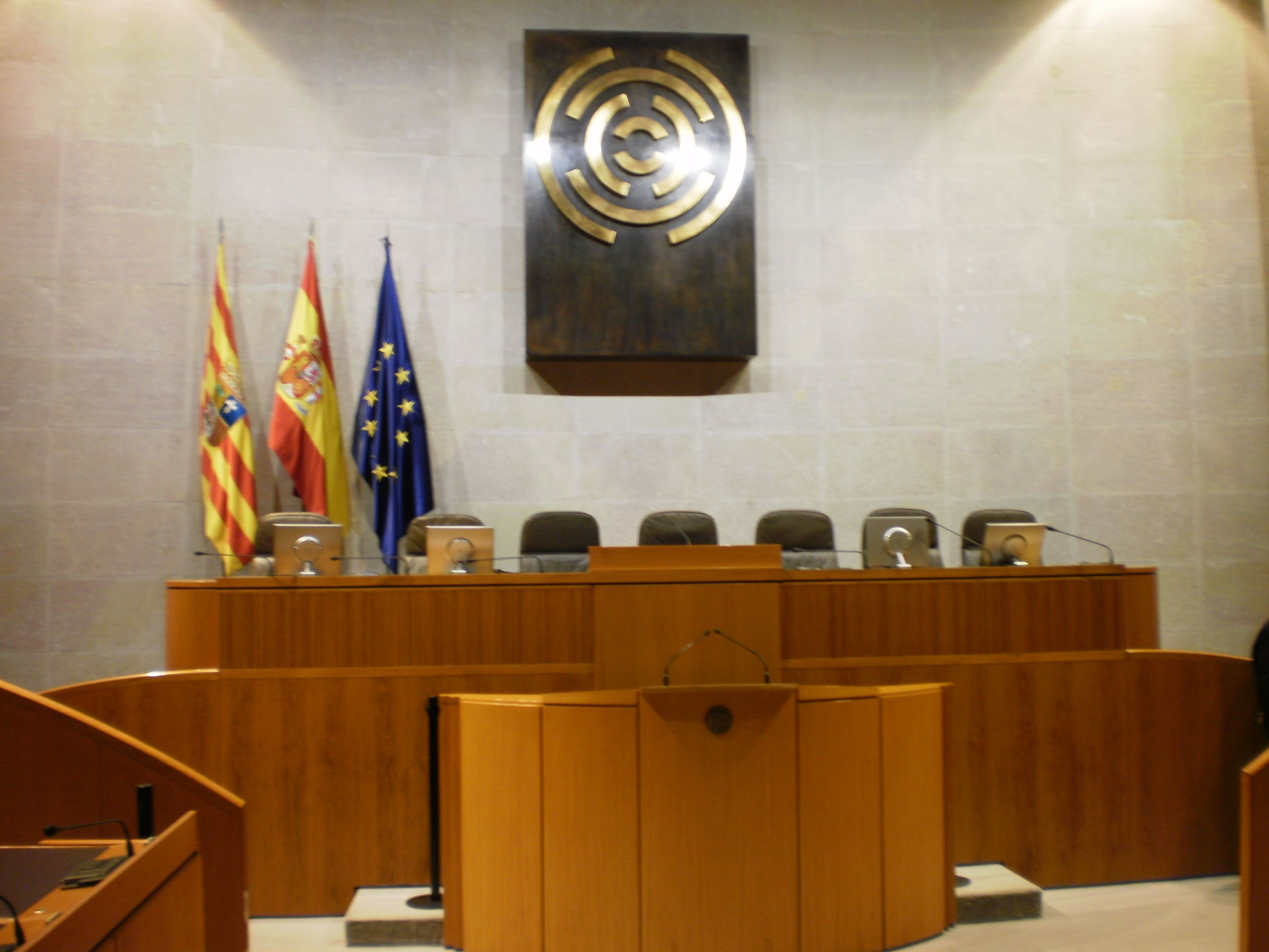 La Aljafería, Zaragoza